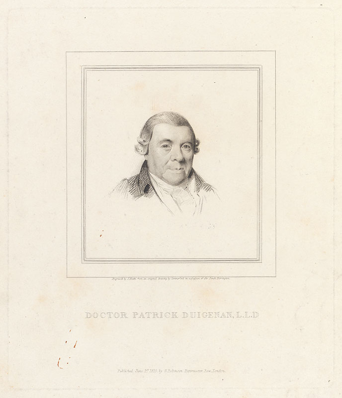 Patrick Duigenan (1735-1816)